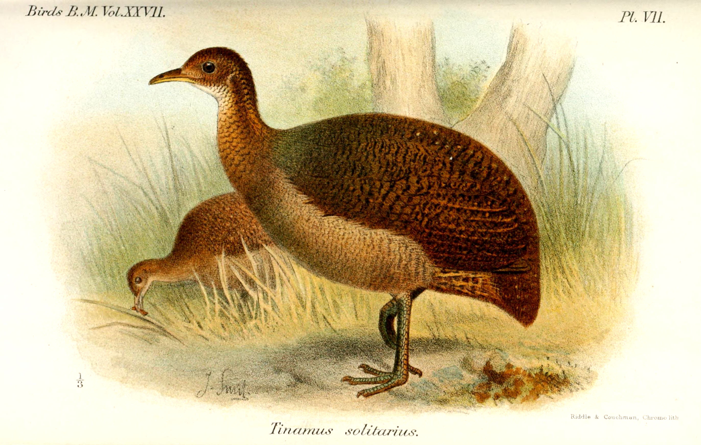 Tinamus solitarius, Solitary Tinamou